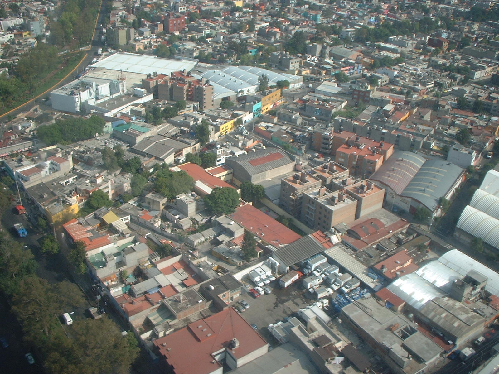 メキシコ国際空港着陸のドラマ/El paisaje de aterrizaje del aeropuerto de Mexico D.F.